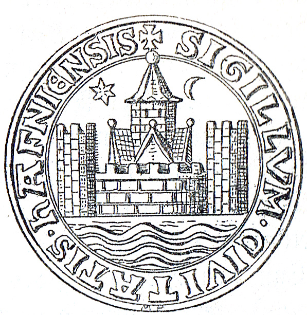 Københavns Segl fra 1296